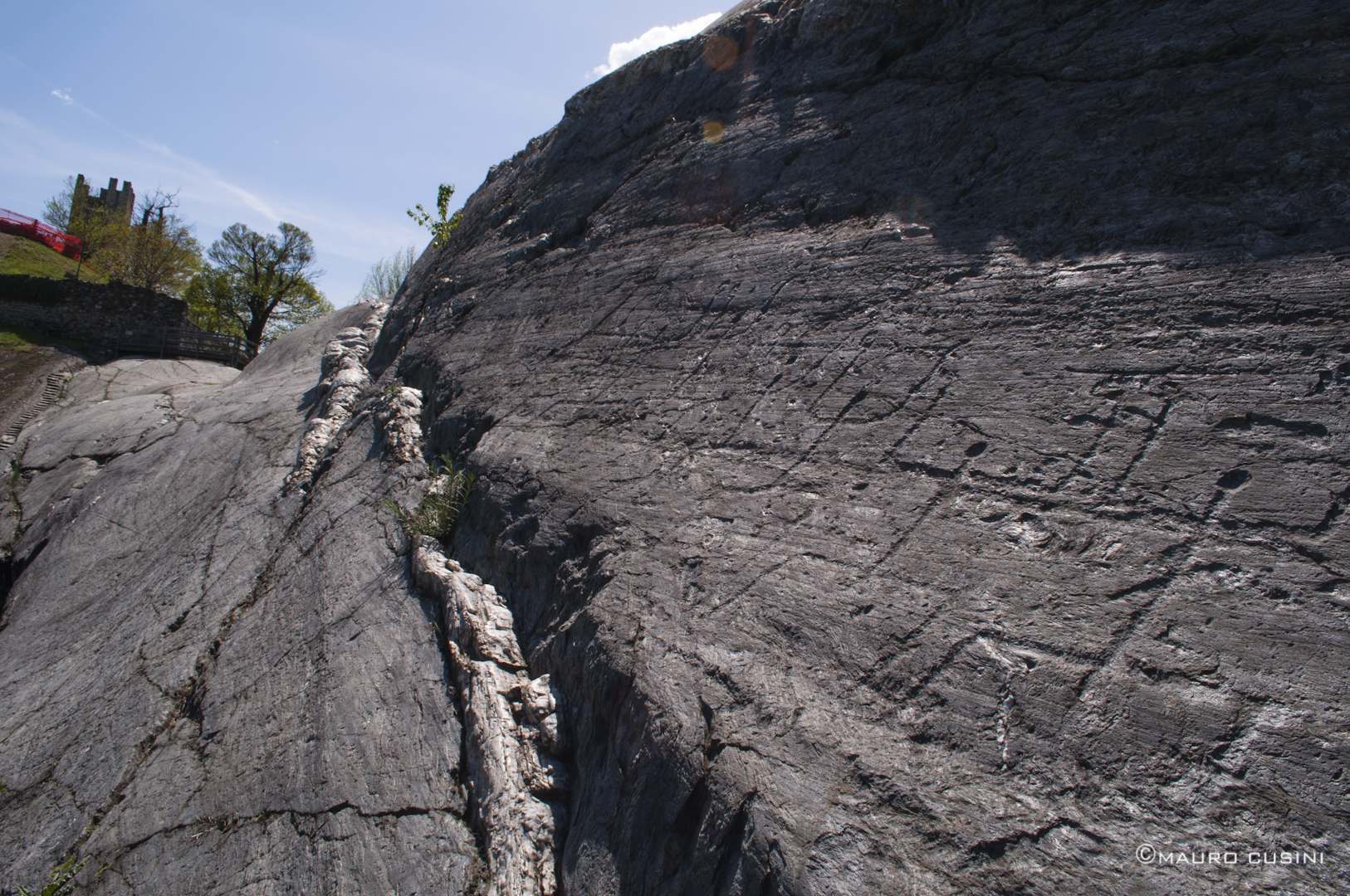 Parco delle Incisioni rupestri di Grosio - MIBAC This is a photo of a monument which is part of cultural heritage of Italy.